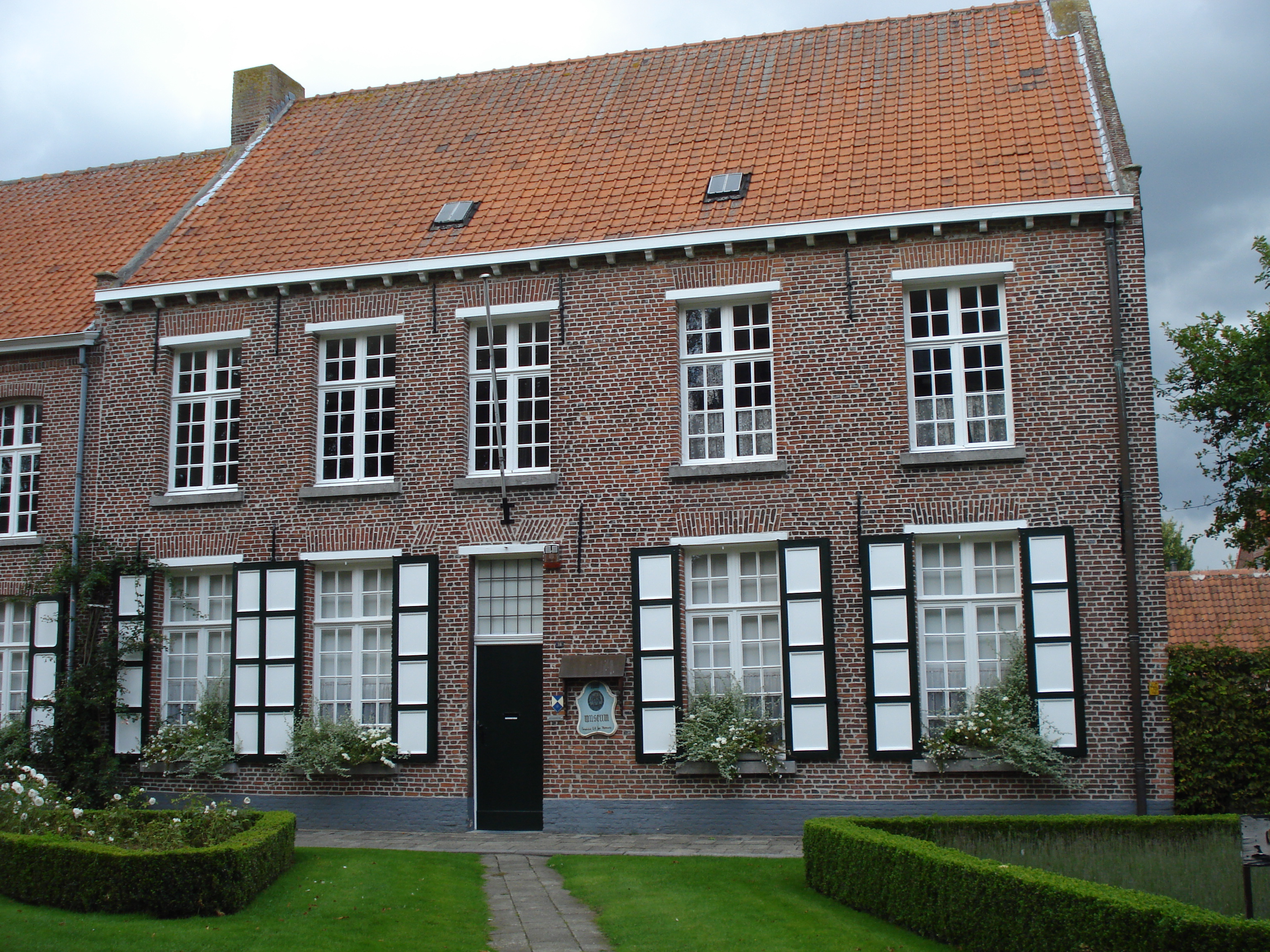 Begijnhofmuseum